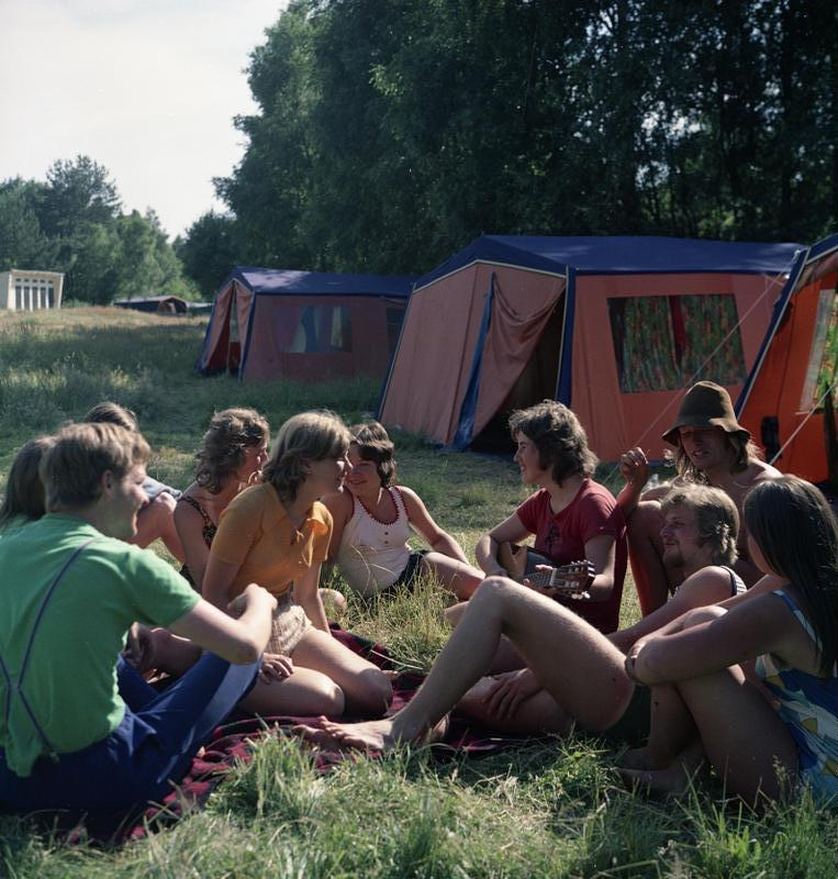 ADN-ZB/Bartocha/8.8.75/Bez.Neubrandenburg: Ferien am Tollensesee verleben diese Mädchen und Jungen. In diesen Tagen erholen sich in allen Bezirken unserer Republik Tausende Schüler und Lehrlinge bei Sport und Spiel und sammeln Kräfte für das neue Schul- bzw. Lehrjahr.